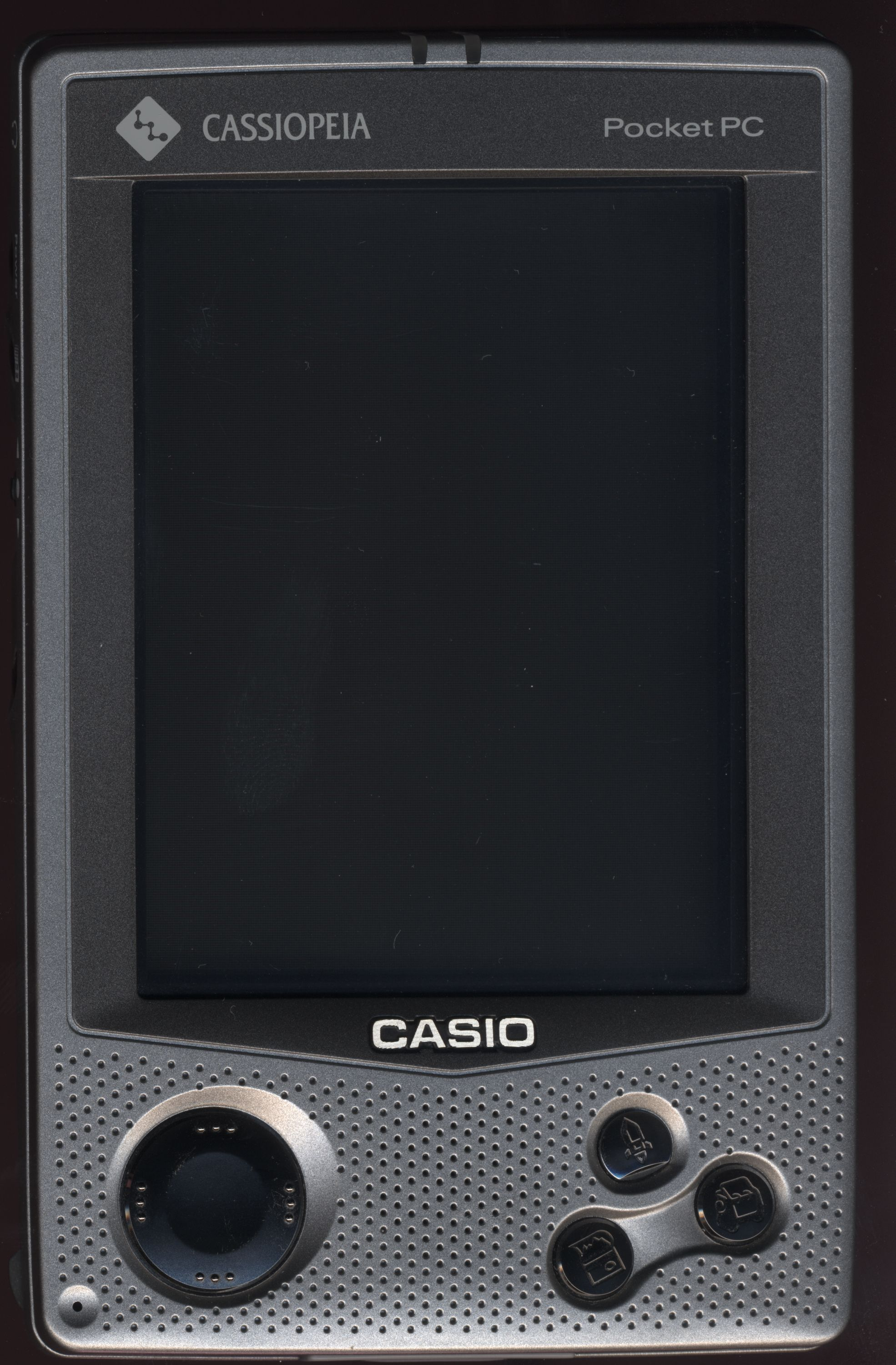 Casio Cassiopeia E-115G